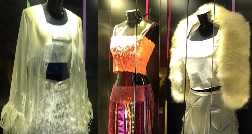 Imagens da Sandy & Junior Experience, exposição sobre a carreira da dupla de cantores Sandy & Junior